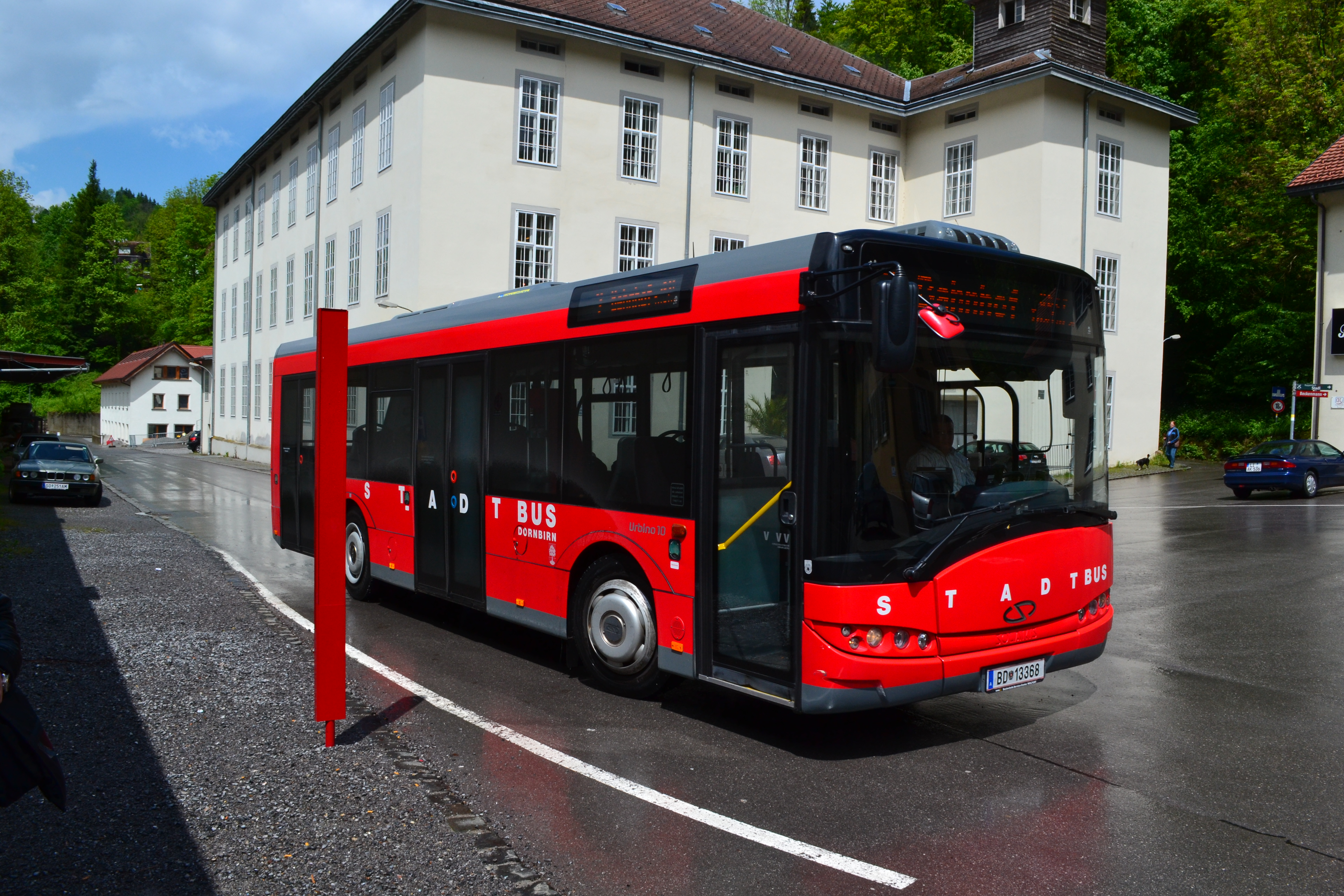 A Rolls-Royce Múzeum Dornbirnban